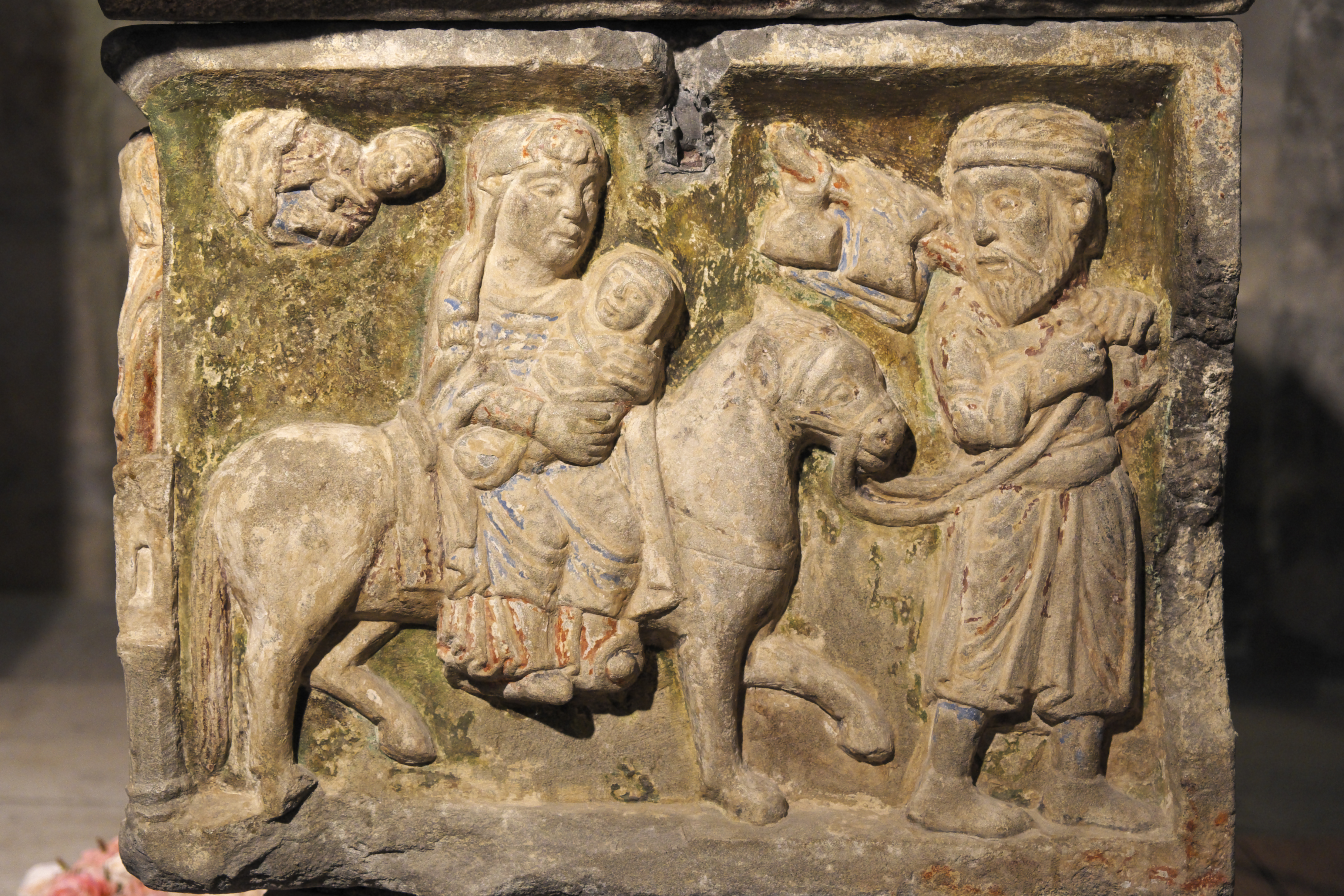 Kathedrale San Vicente in Roda de Isábena in der Provinz Huesca (Aragón/Spanien), Sarkophag des hl. Raimund von Roda